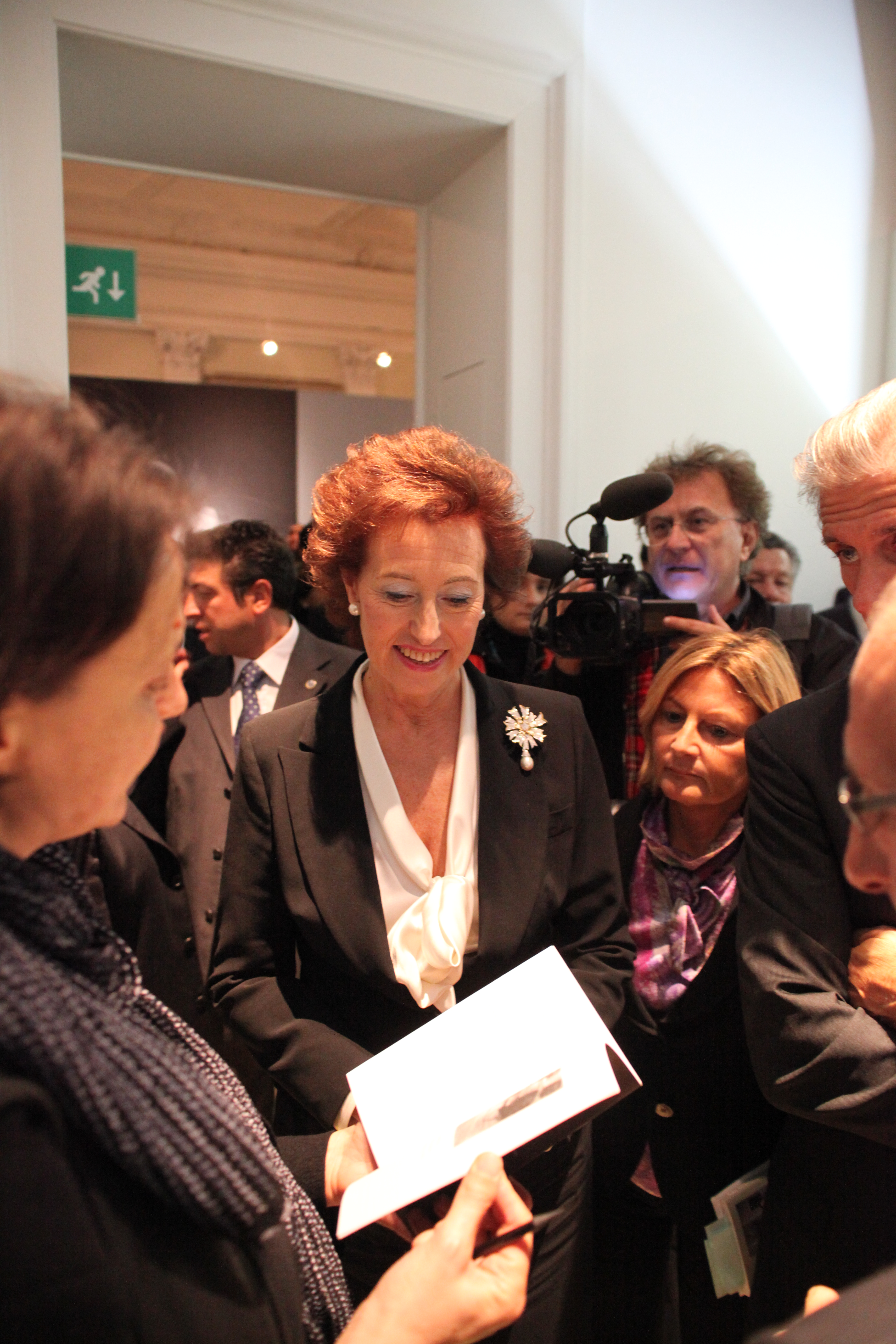 Mostra: EDWARD HOPPER MILANO, PALAZZO REALE 14 OTTOBRE 2009 - 31 GENNAIO 2010